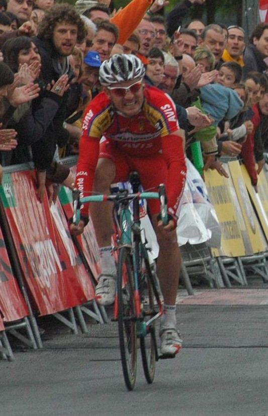 Baden Cooke. Euskal Bizikleta 2008, 2nd in stage 2